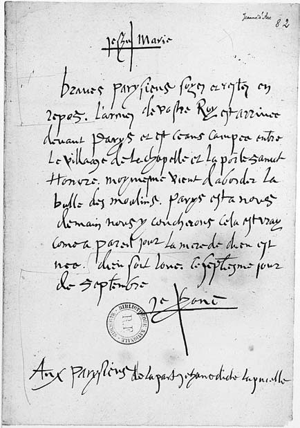 This is a known forgery made by Denis Vrain-Lucas ( It purports to be a letter dictated by Joan of Arc, but has been declared invalid by experts. The Russian Wikipedia article on Vrain-Lucas includes this letter as an example of his many forgeries (which included "letters" by Mary Magdalene from the Bible, Cleopatra VII, and lots of other historical figures who mysteriously all wrote their letters in French, at least in Vrain-Lucas' version of things....)